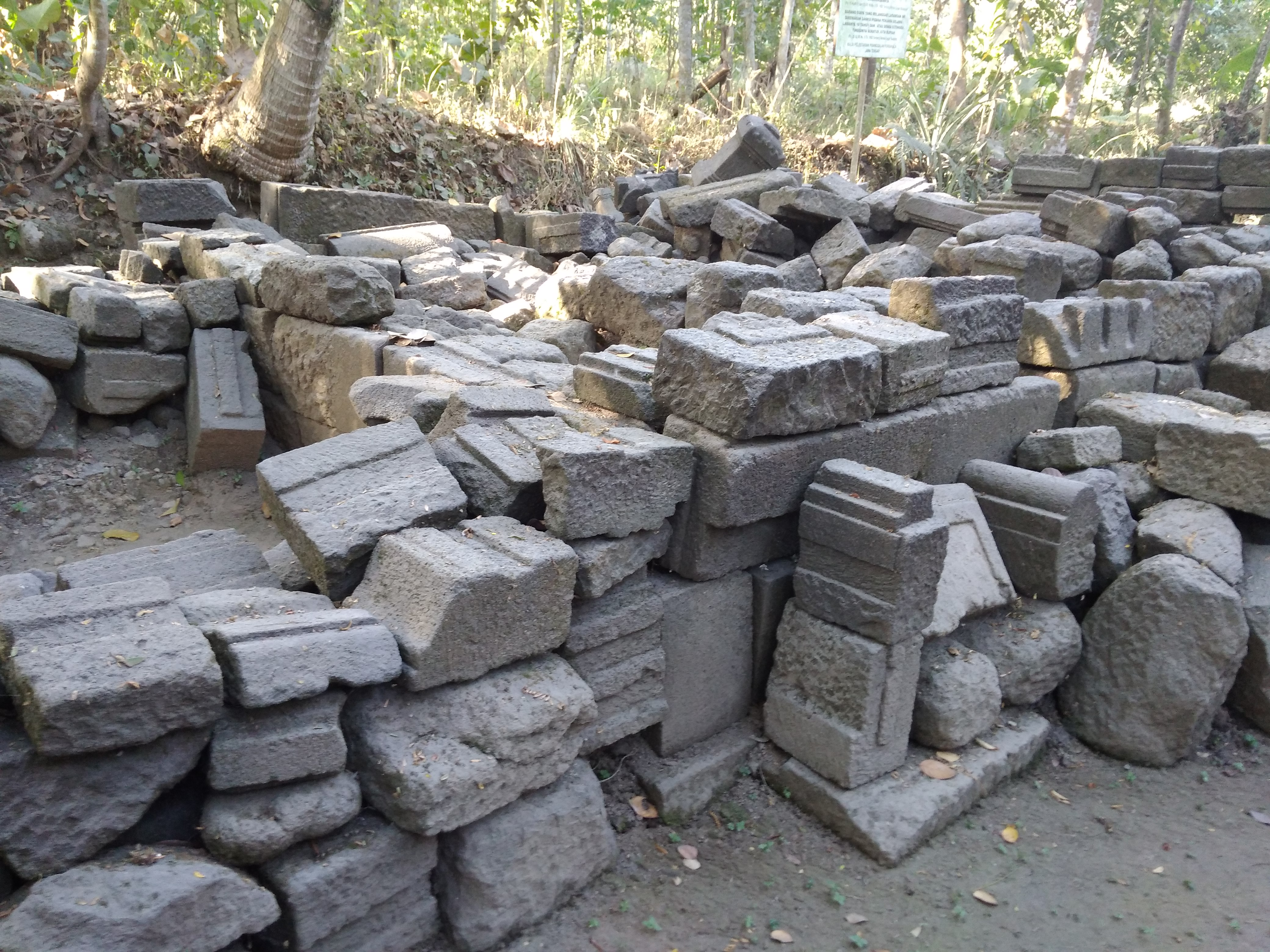 Reruntuhan Situs Kaliworo B di Kecamatan Manisrenggo, Kabupaten Klaten